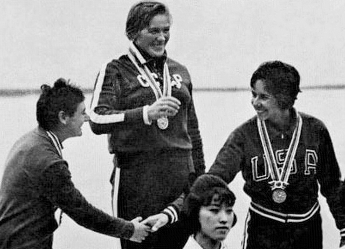 Hilde Lauer, Lyudmila Pinayeva, Marcia Jones, 1964 Olympics